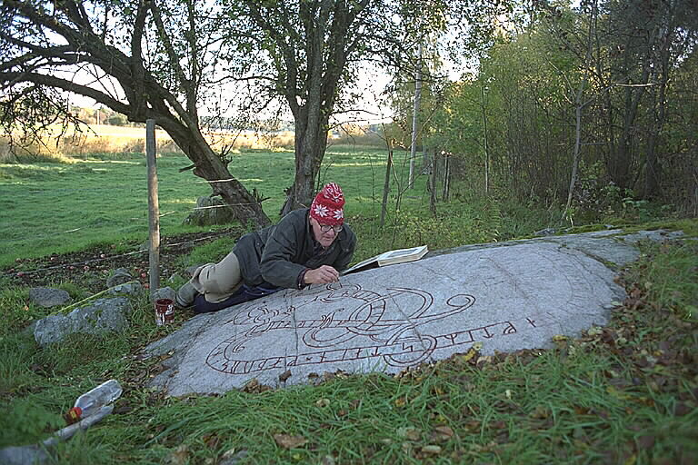 Täby 46:2. Inskriften på runhällen lyder: Torkel och Fulluge lät hugga denna häll och göra bron efter Sten sin fader. Olev högg. Täby 46:2